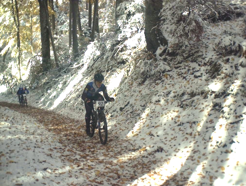 MTB Uphill Sljeme 2003, Zagreb, Croatia